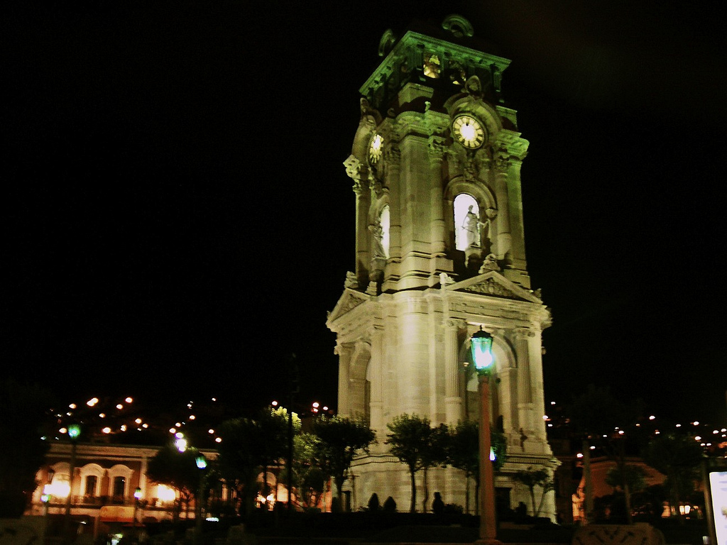 Noche en Pachuca